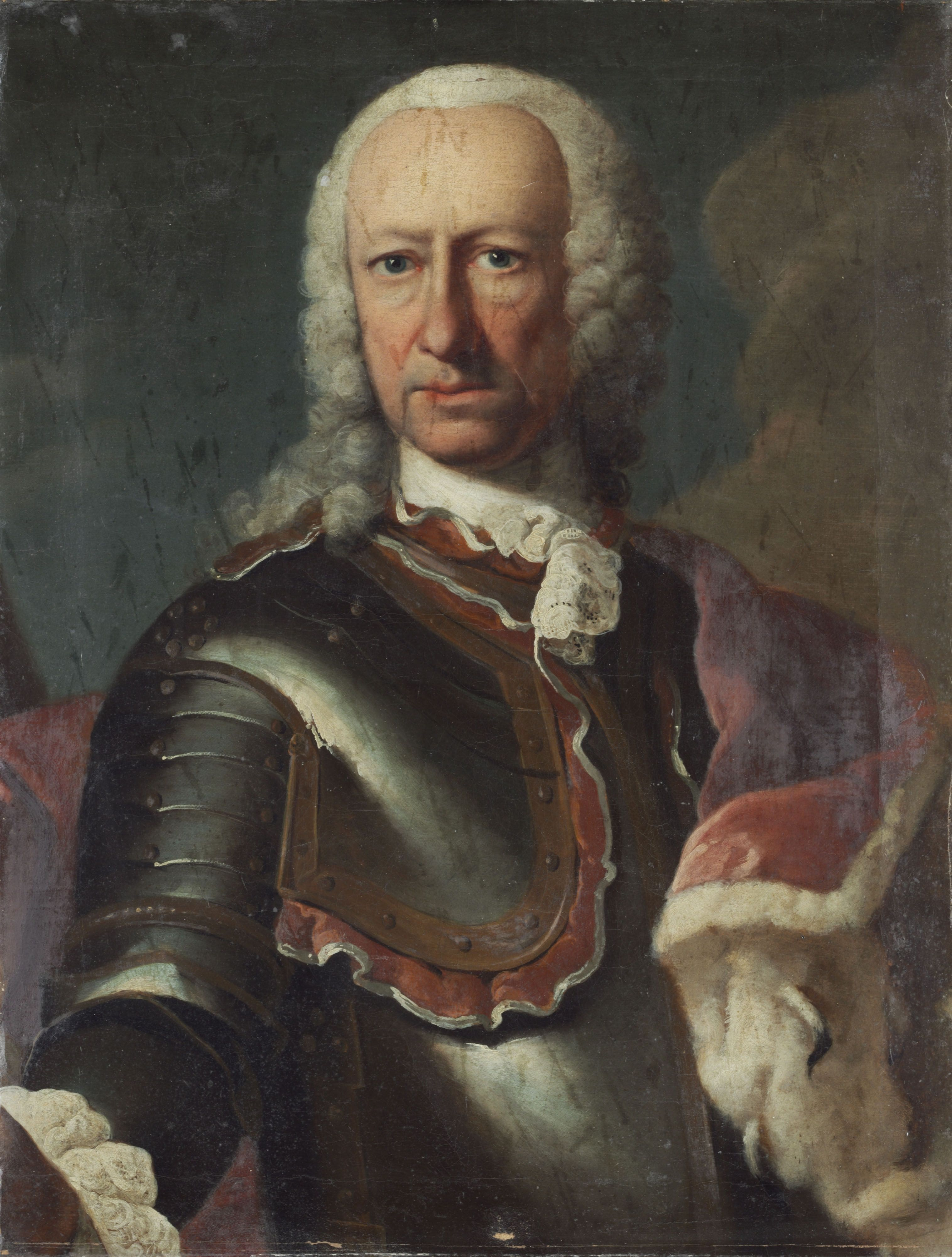 Wilhelm Landgraf von Hessen-Philippsthal-Barchfeld (1692-1761) im Harnisch